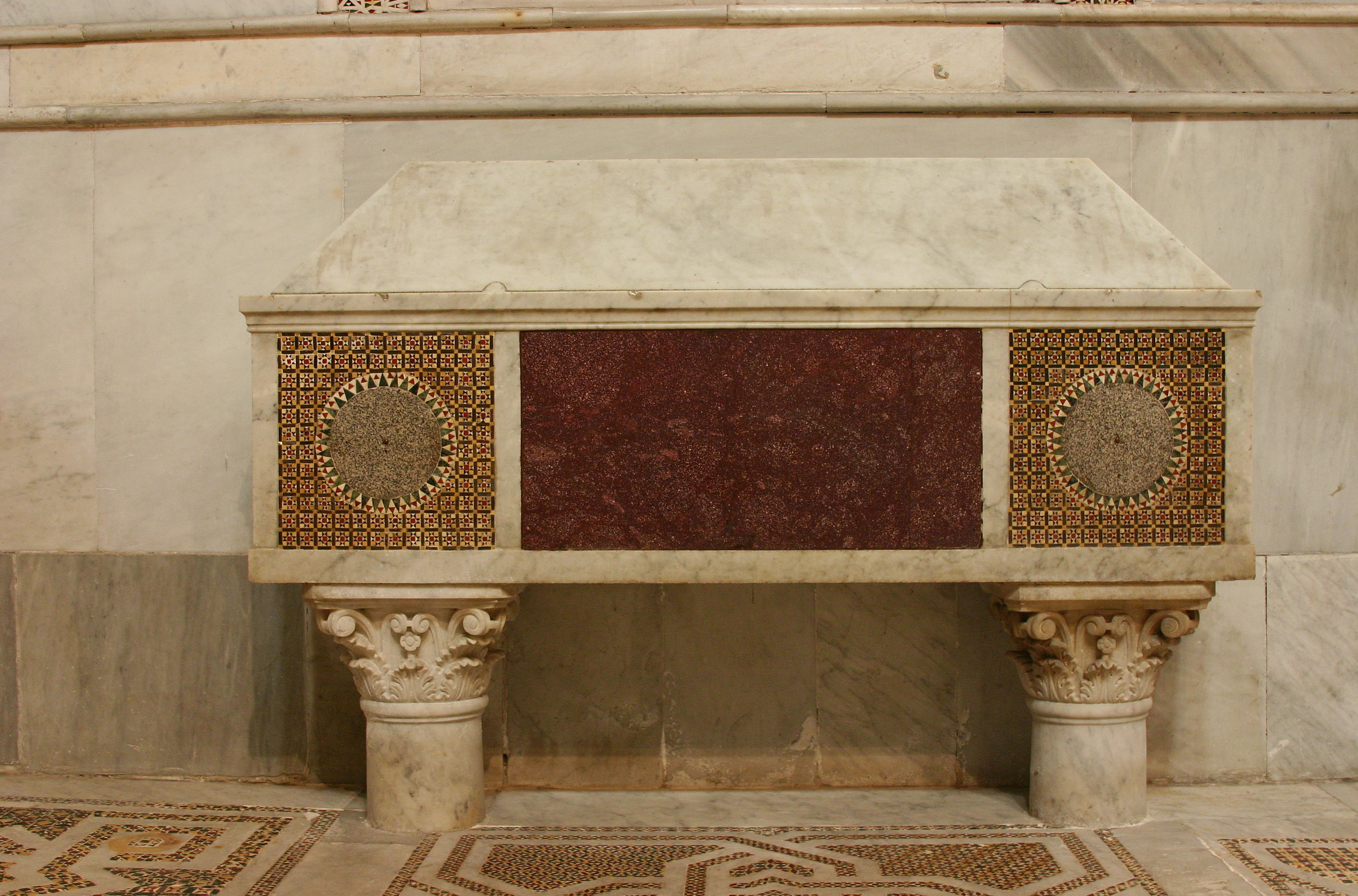 Cathedral of Monreale